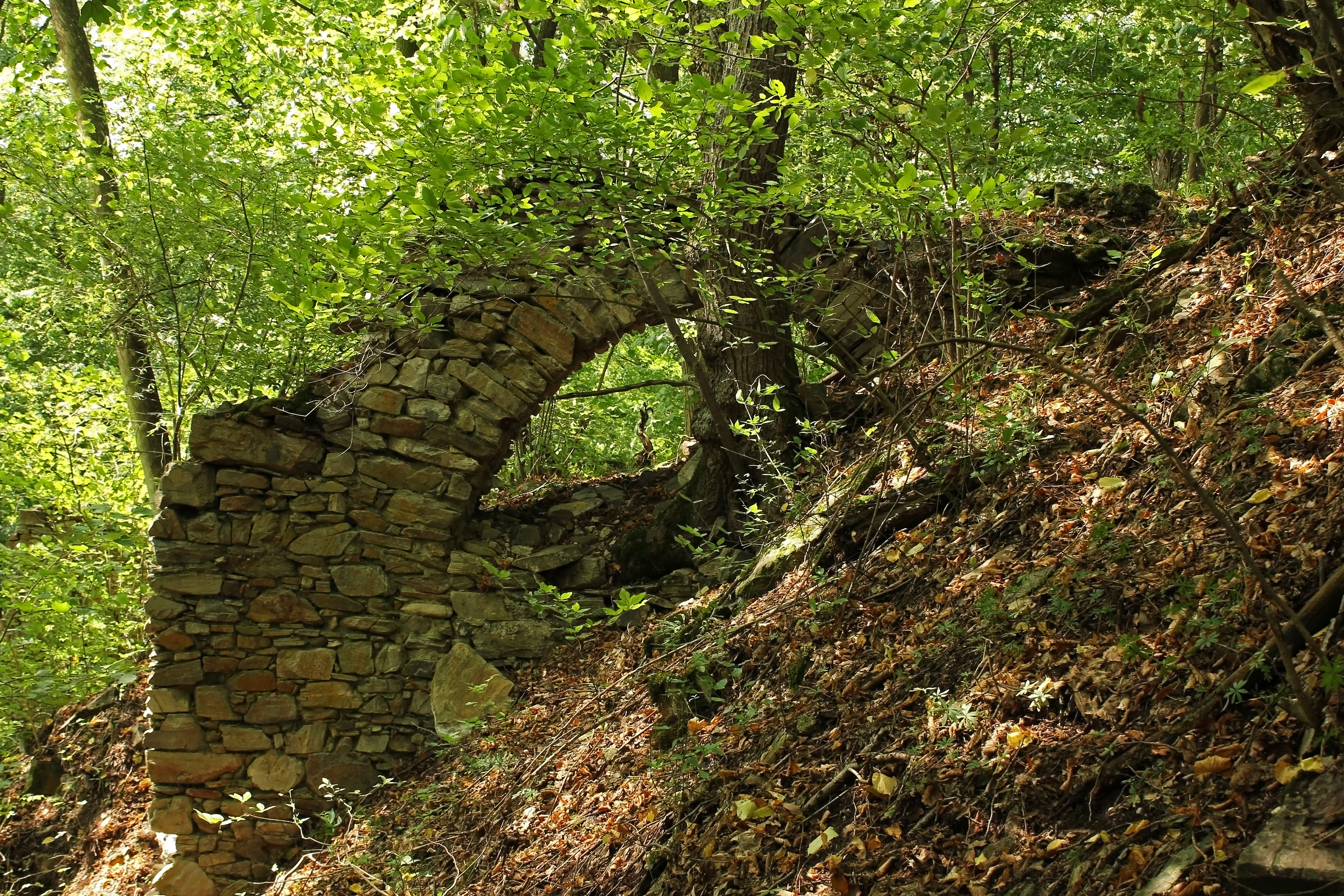 Die etwa 155 Meter lange und ca. 30 Meter breite Burg Steinegg entstand um 1210. Sie wurde bereits im 15. Jahrhundert gewaltsam zerstört.